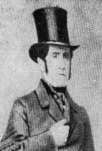 Enrique Campino Salamanca (1794-1874) Militar, político, prócer de la Independencia y aristócrata chileno.